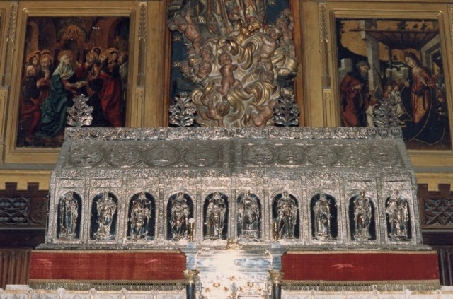 Arca de plata con los restos de San Froilán. Estuvo situada en el altar mayor de la catedral de León, y fue realizada a principios del siglo XVI por el orfebre Enrique de Arfe.